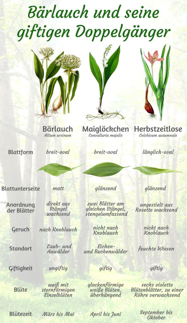 Die Pflanzen Bärlauch, Maiglöckchen und Herbstzeitlose im Vergleich